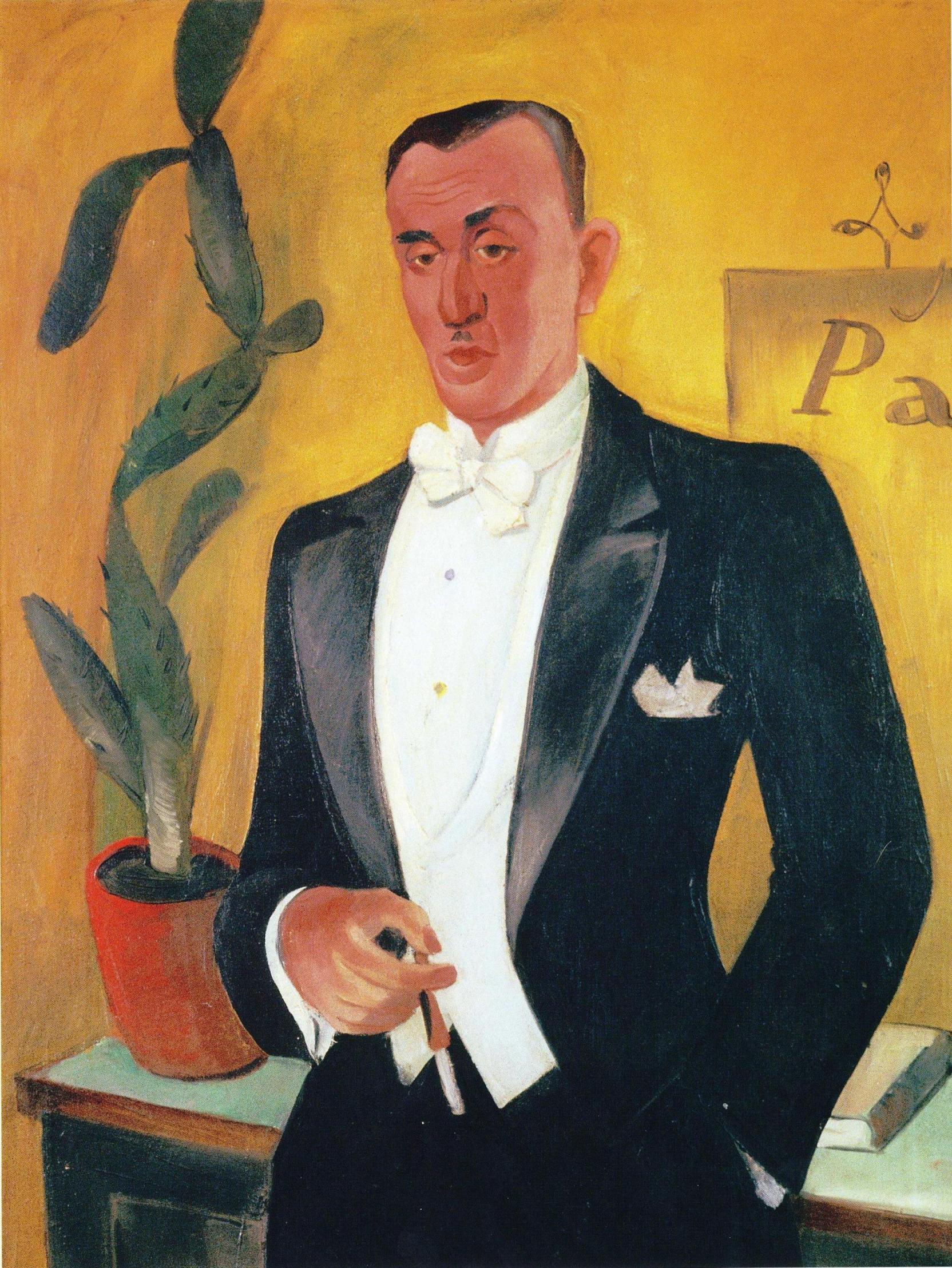 Kirjailija Olavi Paavolainen (1903–1964). Muotokuvan omistaa kustannusyhtiö WSOY.